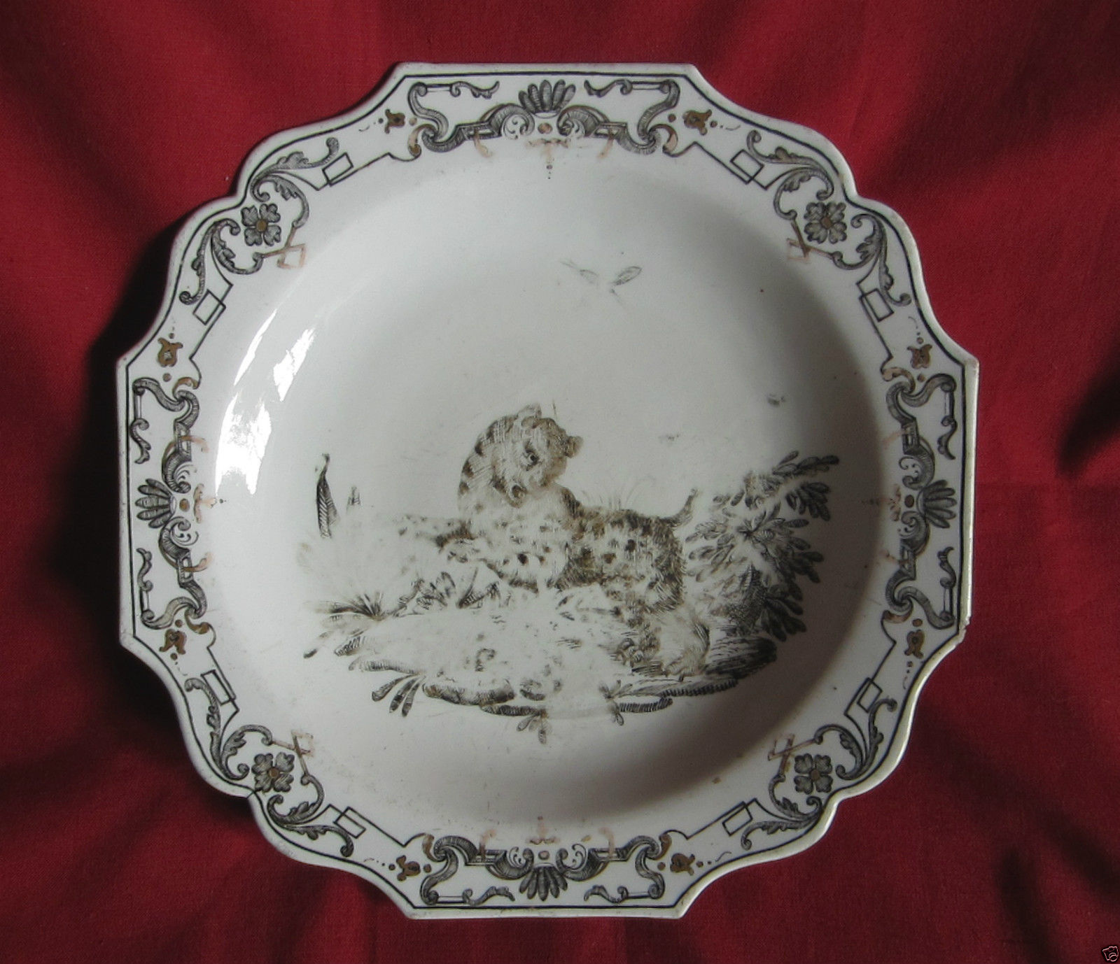 from The Liechtenstein Service and the Saint Blasien Service made for the Emperor Charles VI - see J.F. Hayward, Viennese Porcelain of the du Paquier Period (London, 1952), p. 208, pl. 39-40-41.